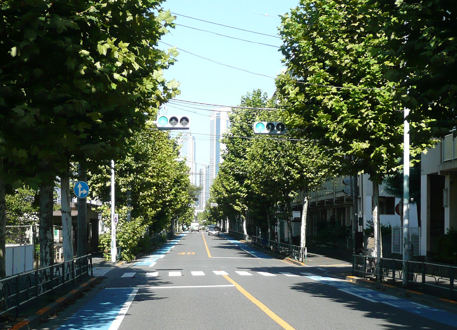 東京都道431号角筈和泉町線（笹塚三丁目にて）